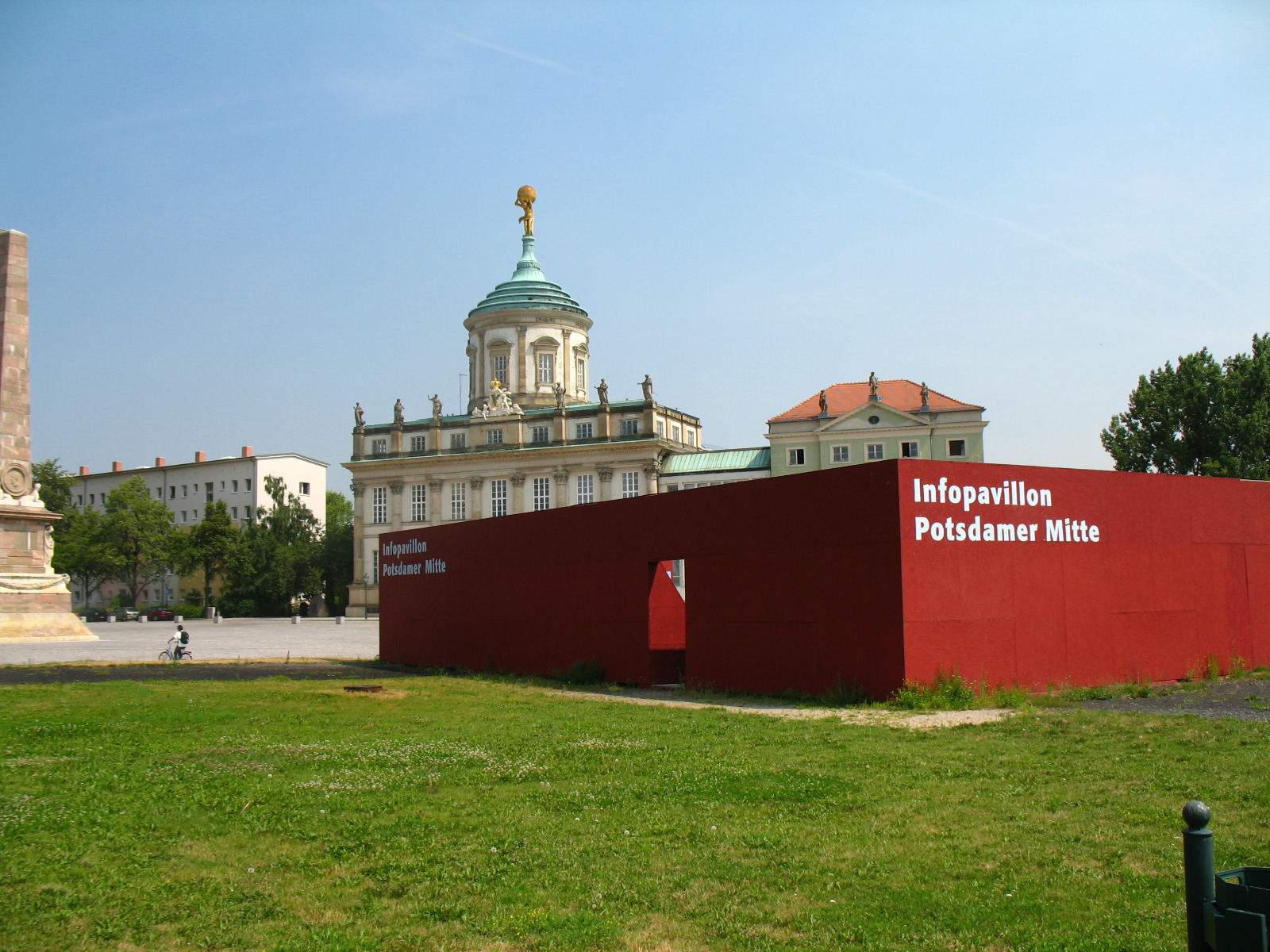 In diesem Infopavillion gibt es Informationen zum Potsdamer Stadtschloss